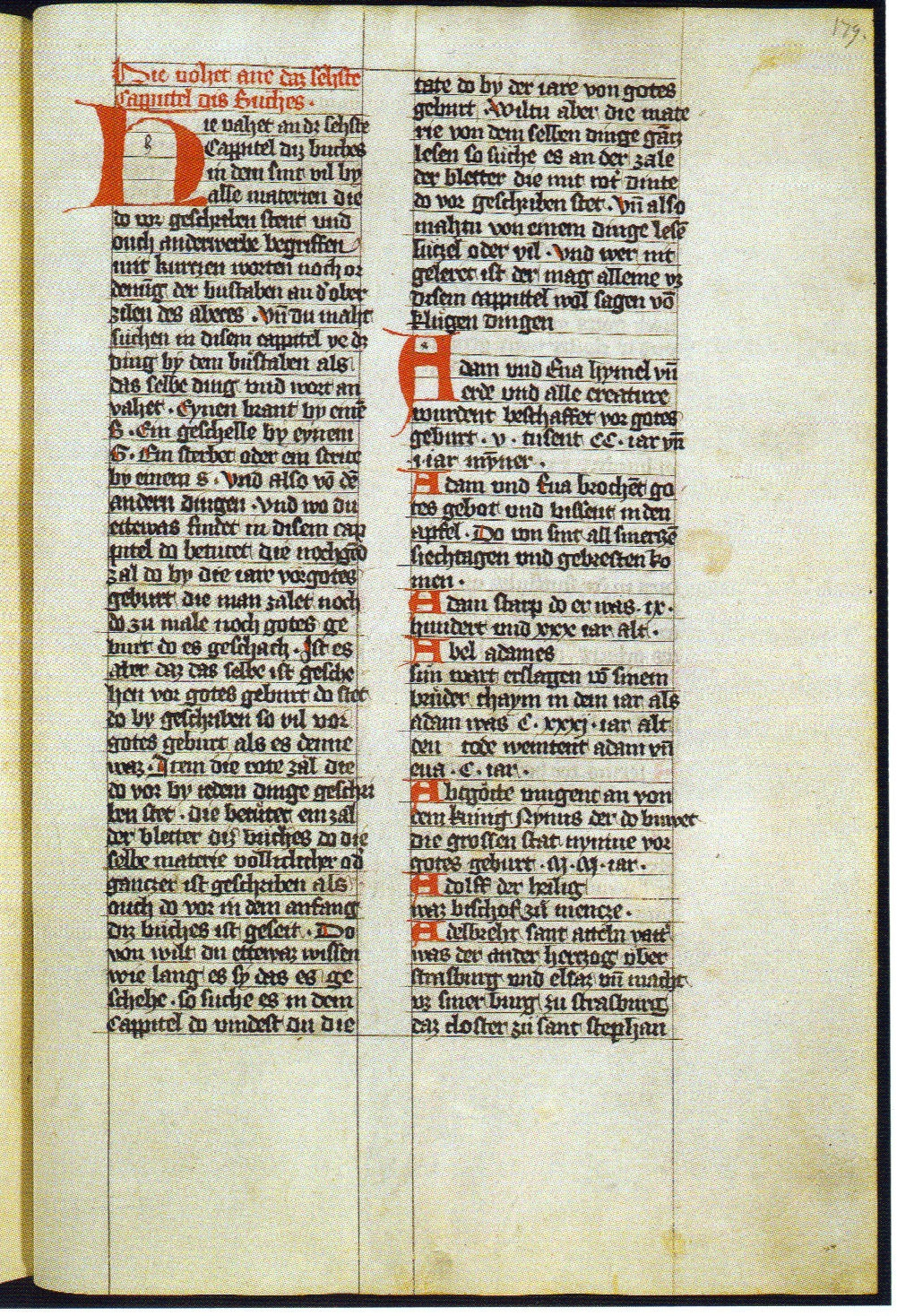 Chronik des Jakob Twinger von Königshofen, Berlin, Staatsbibliothek, Mgf 769, Bl. 179r